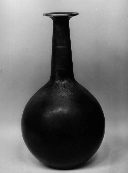 Vase; Metalwork-Bronze